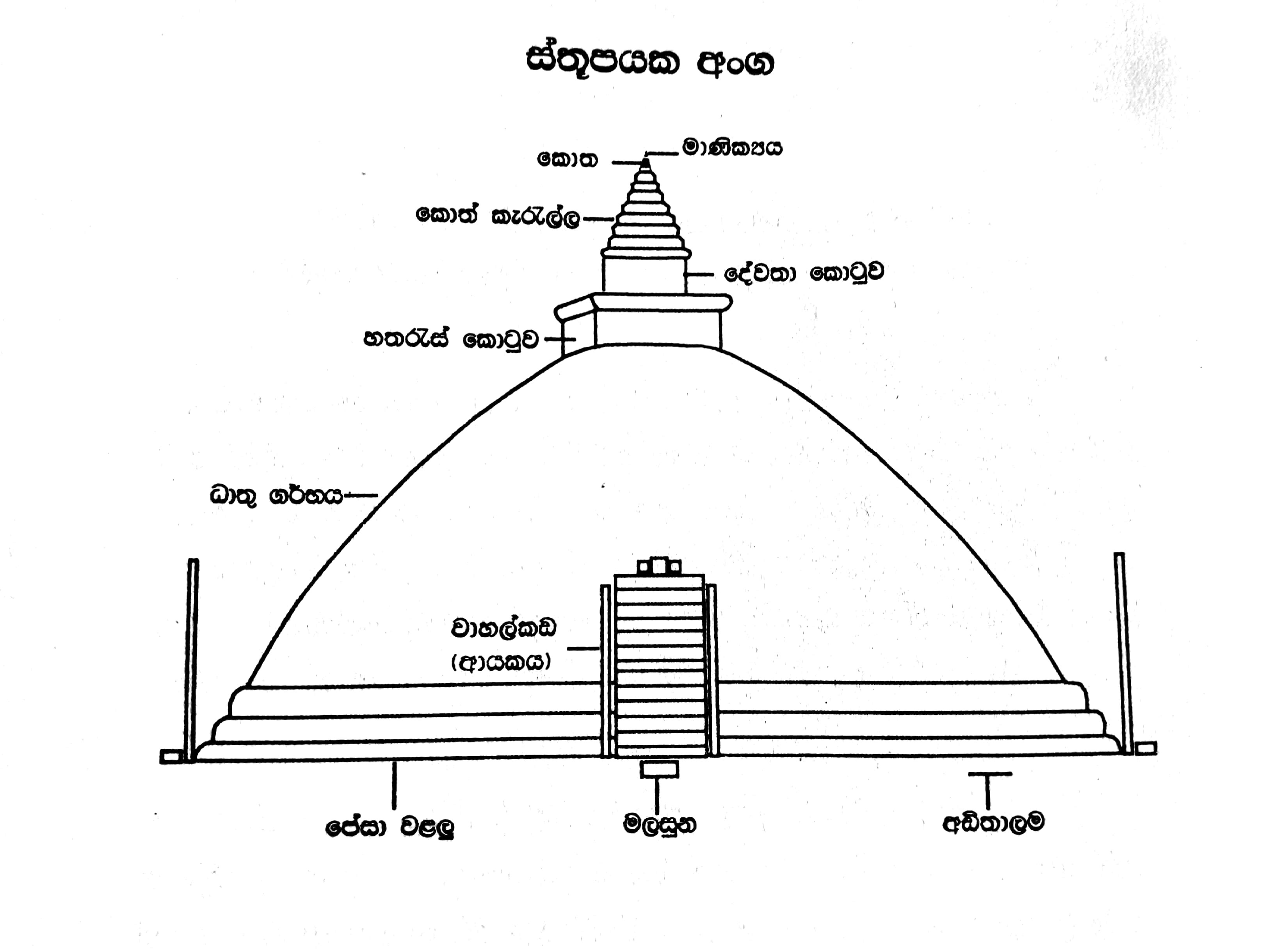 සිංහල: ශ්‍රි ලංකාවේ ස්තූපයක කොටස්